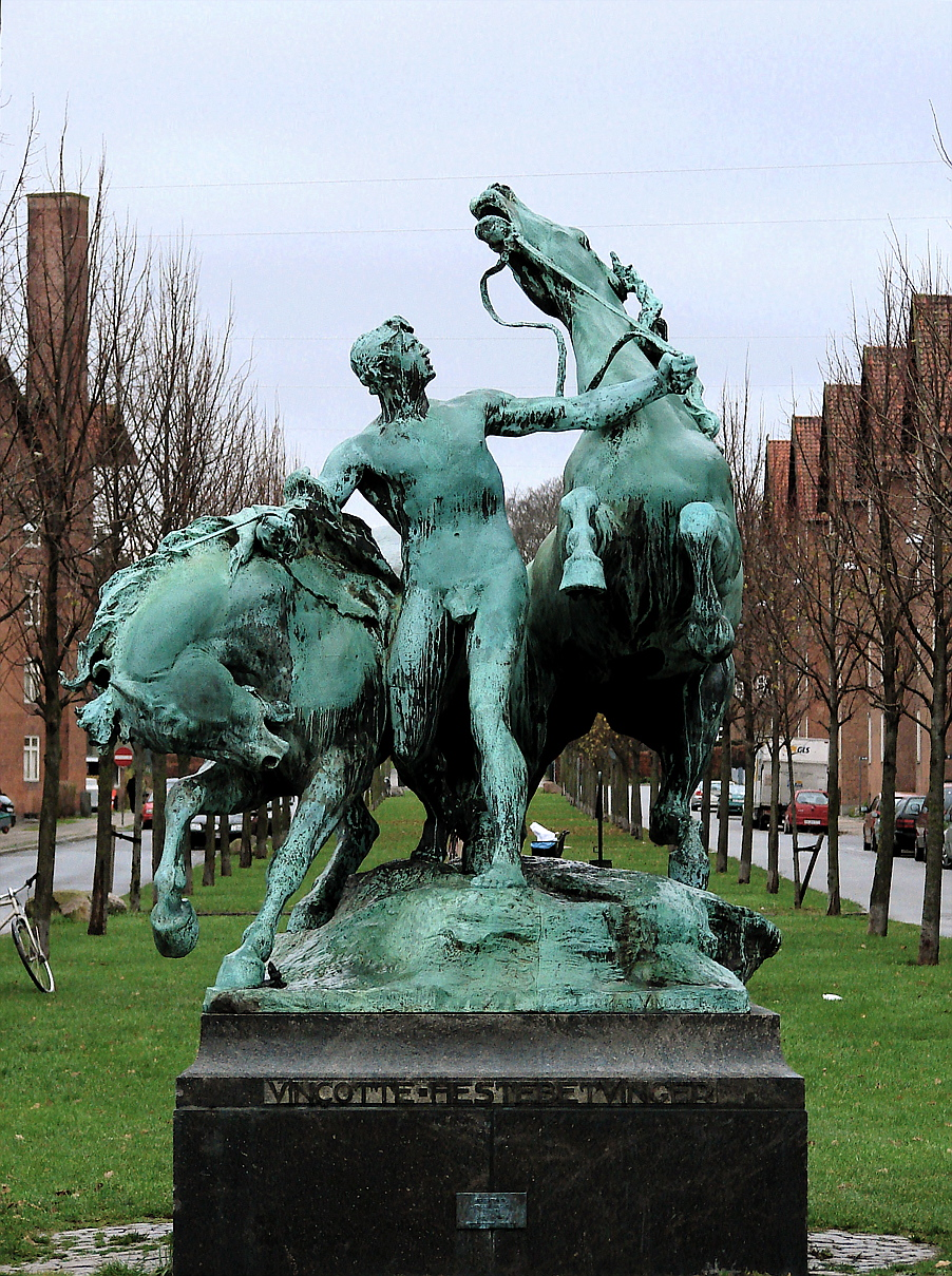 Hestebetvingeren (Le Dompteur de Chevaux), Thomas Vinçotte (1850-1925), Hjørnet af Enghavevej og Bavnehøj Allé, København, opstillet 1914